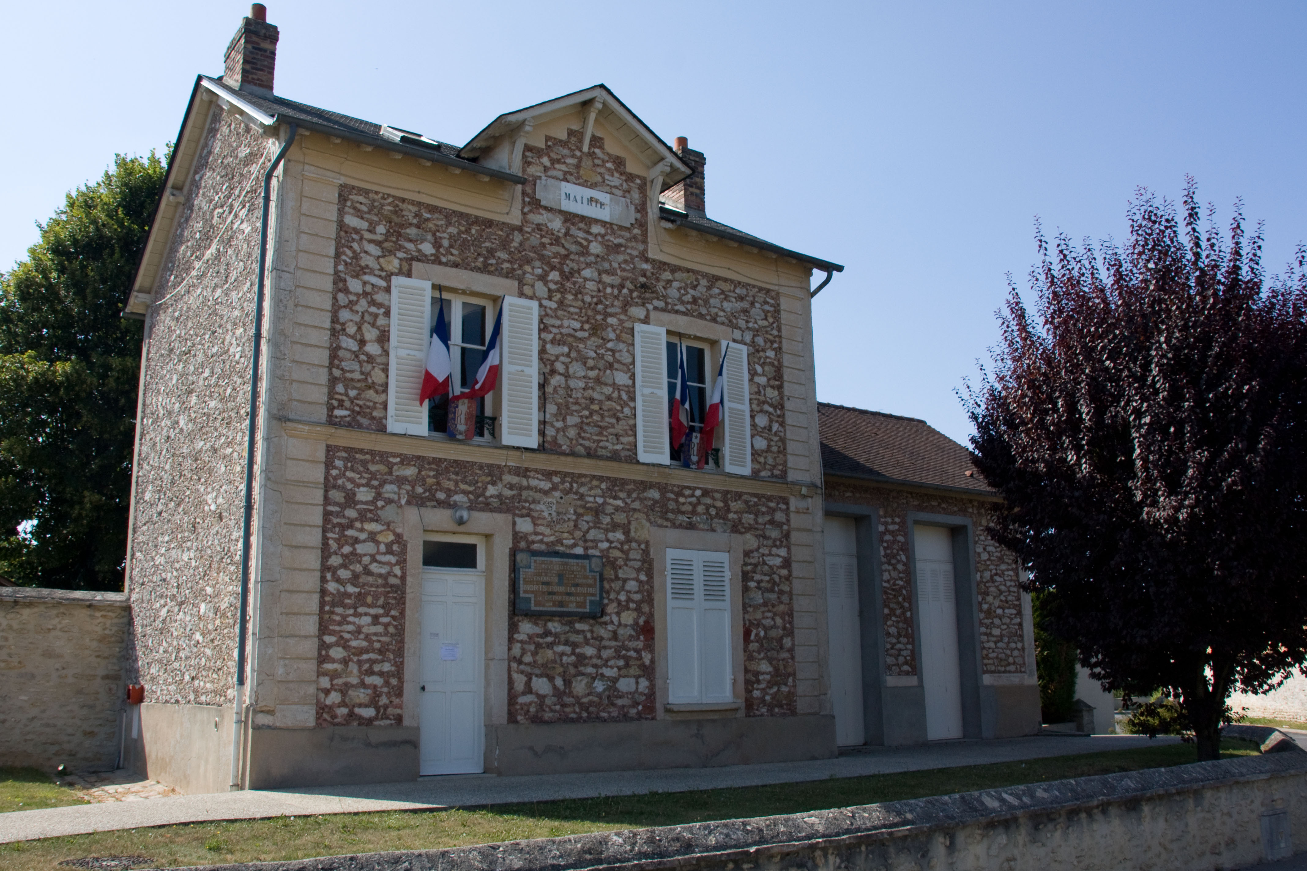 Mairie de Courdimanche-sur-Essonne, Courdimanche-sur-Essonne, Essonne, France